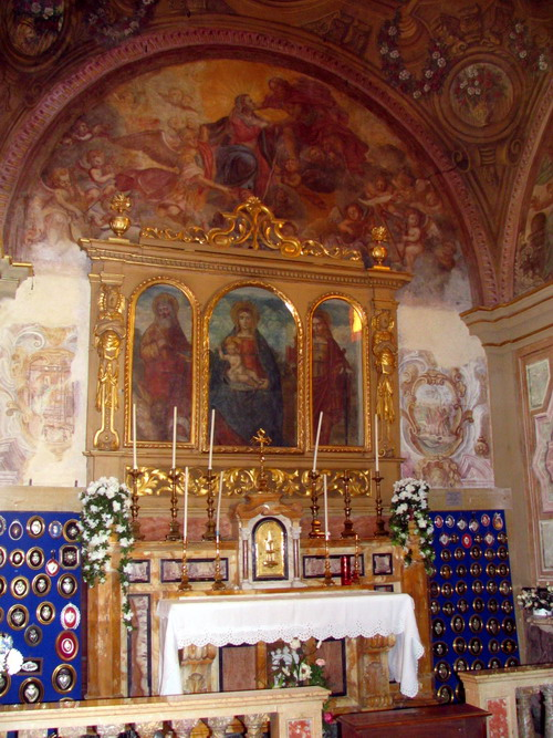 Asti, Madonna del Portone , il Sacello con l'immagine Santa.